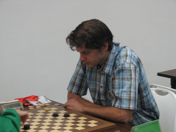 Kees Thijssen mõttespordi maailmamängudel Pekingis.